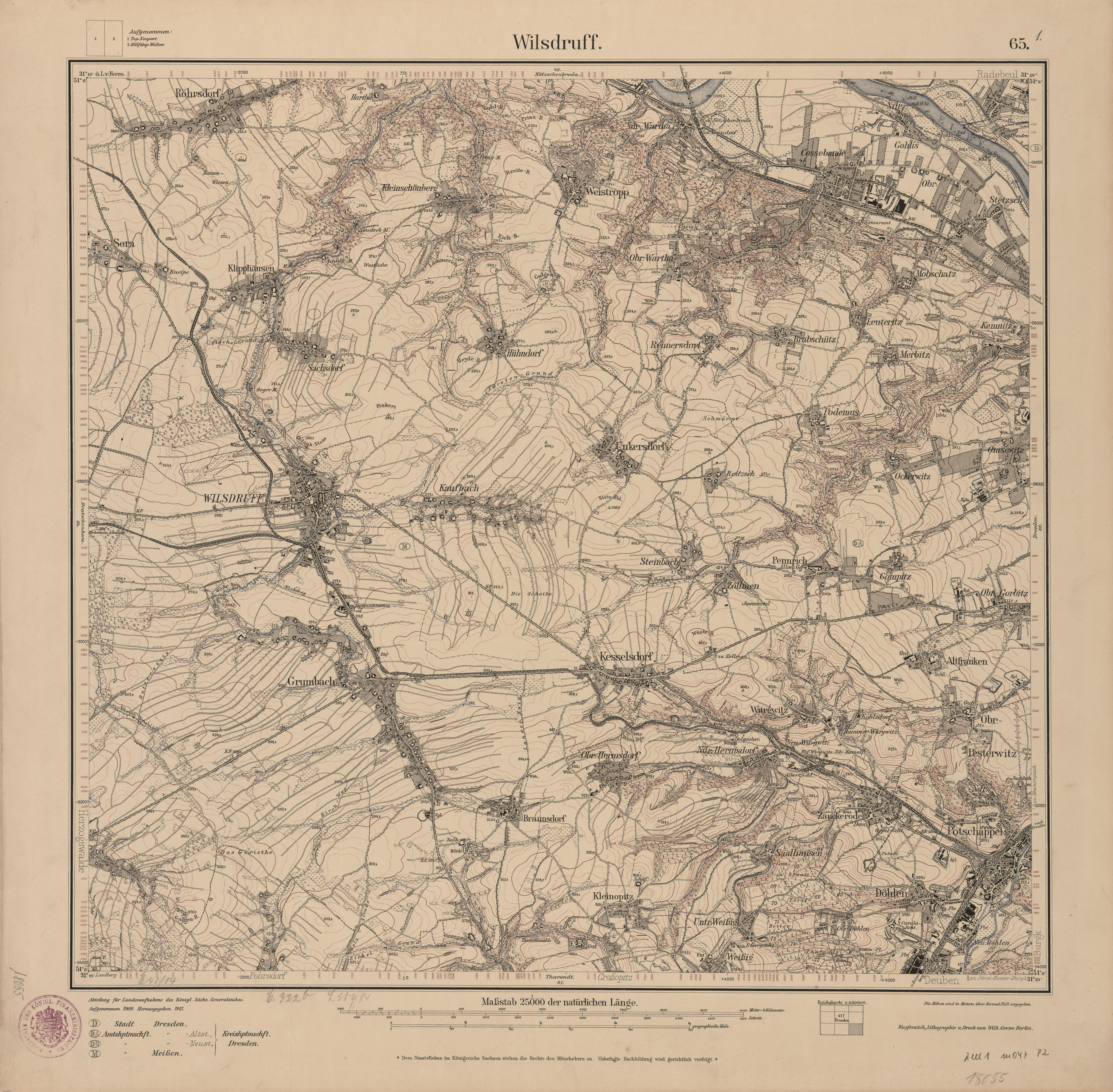 Topographische Karte (Messtischblätter) Sachsen, Ausschnitt Wilsdruff, Abteilung für Landesaufnahme des Königl. Sächs. Generalstabes, 1:25000, 48 x 45 cm, Blatt 65, 1913.